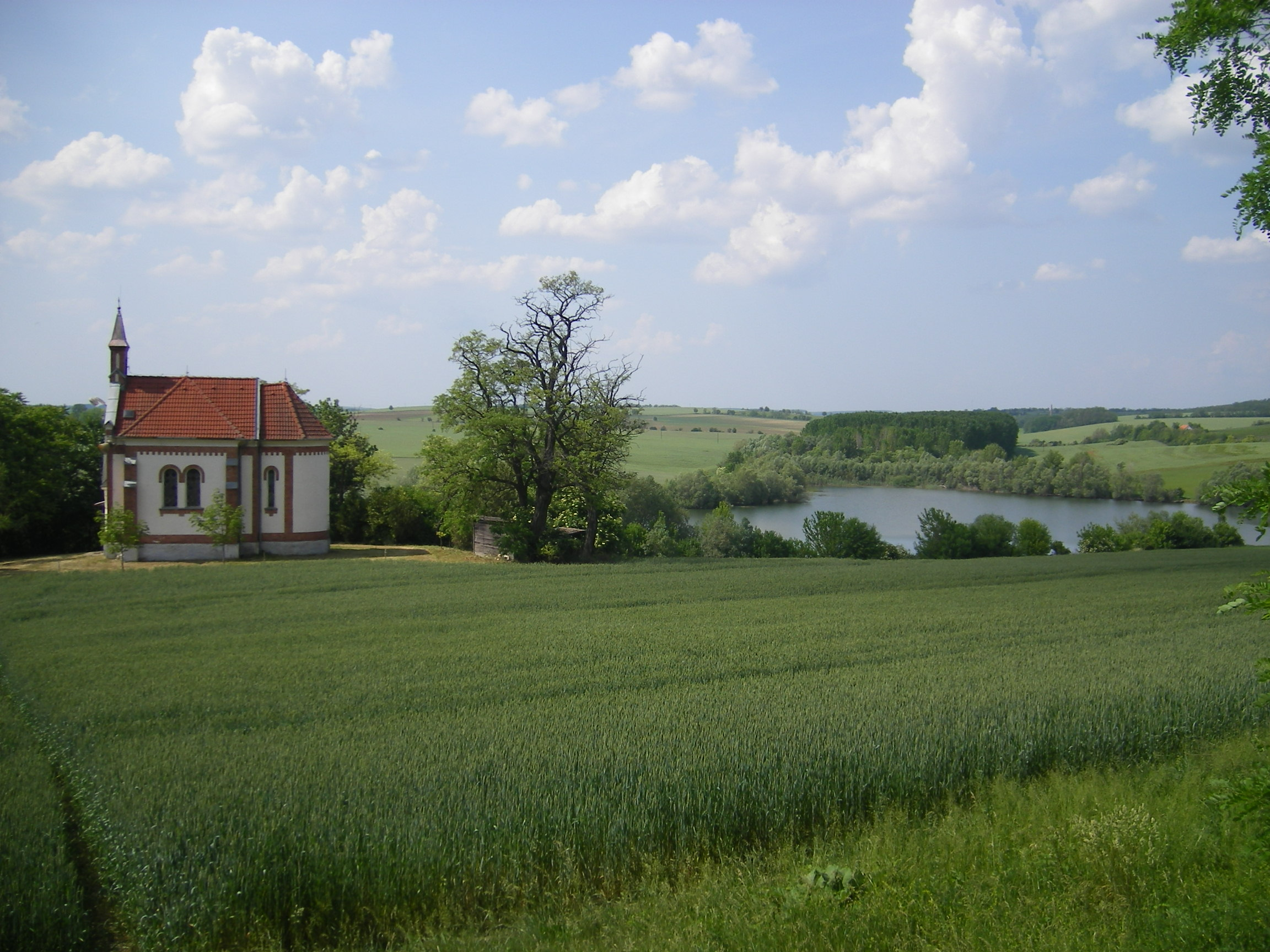 Kürt - a ciglédi kápolna (Búcsújáróhely)